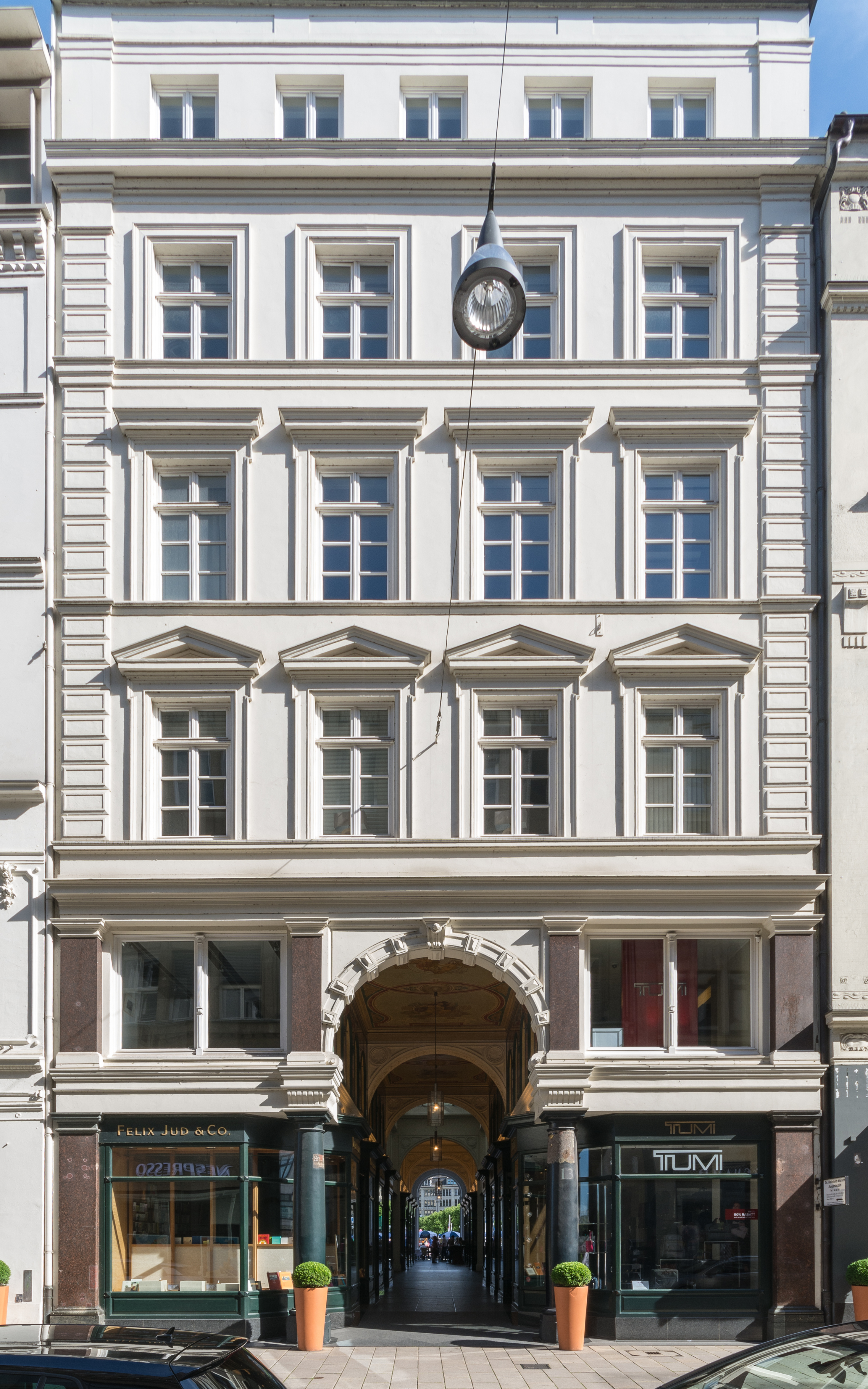 Wohngeschäftshaus Neuer Wall 13 mit der Mellinpassage in Hamburg-Neustadt. This is a photograph of an architectural monument.